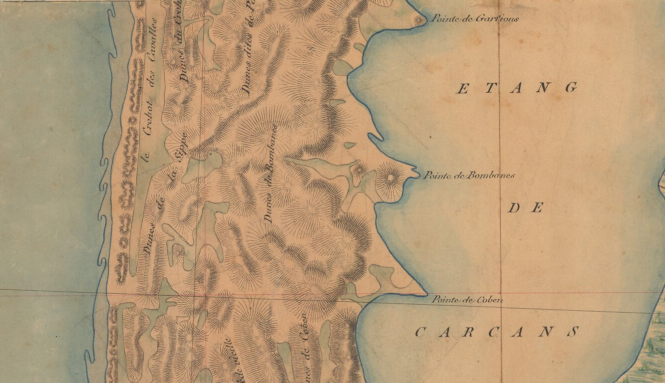 Extrait de la carte d'Etat-major de 1866, étang de Carcans